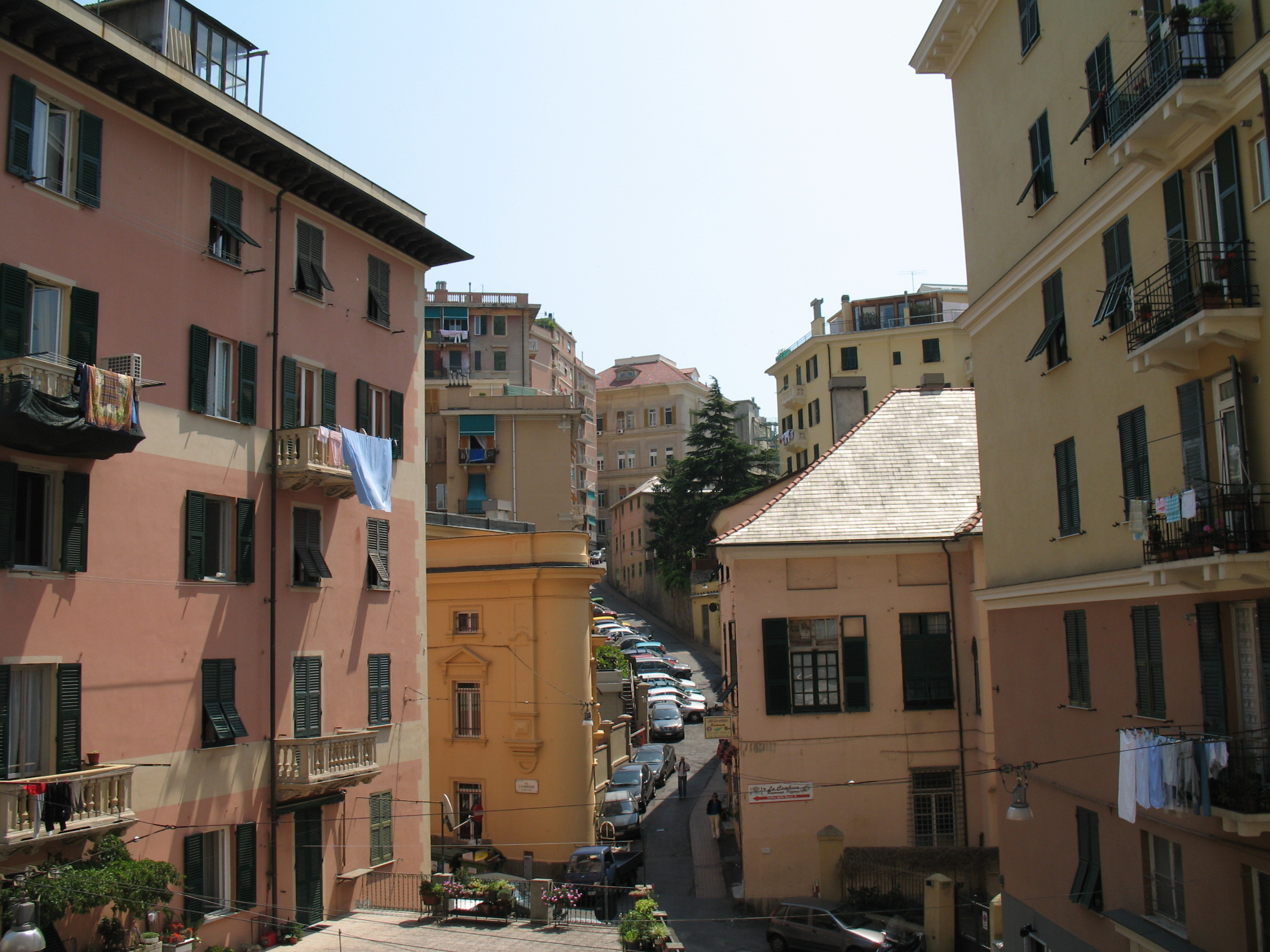 Immagine da Genova